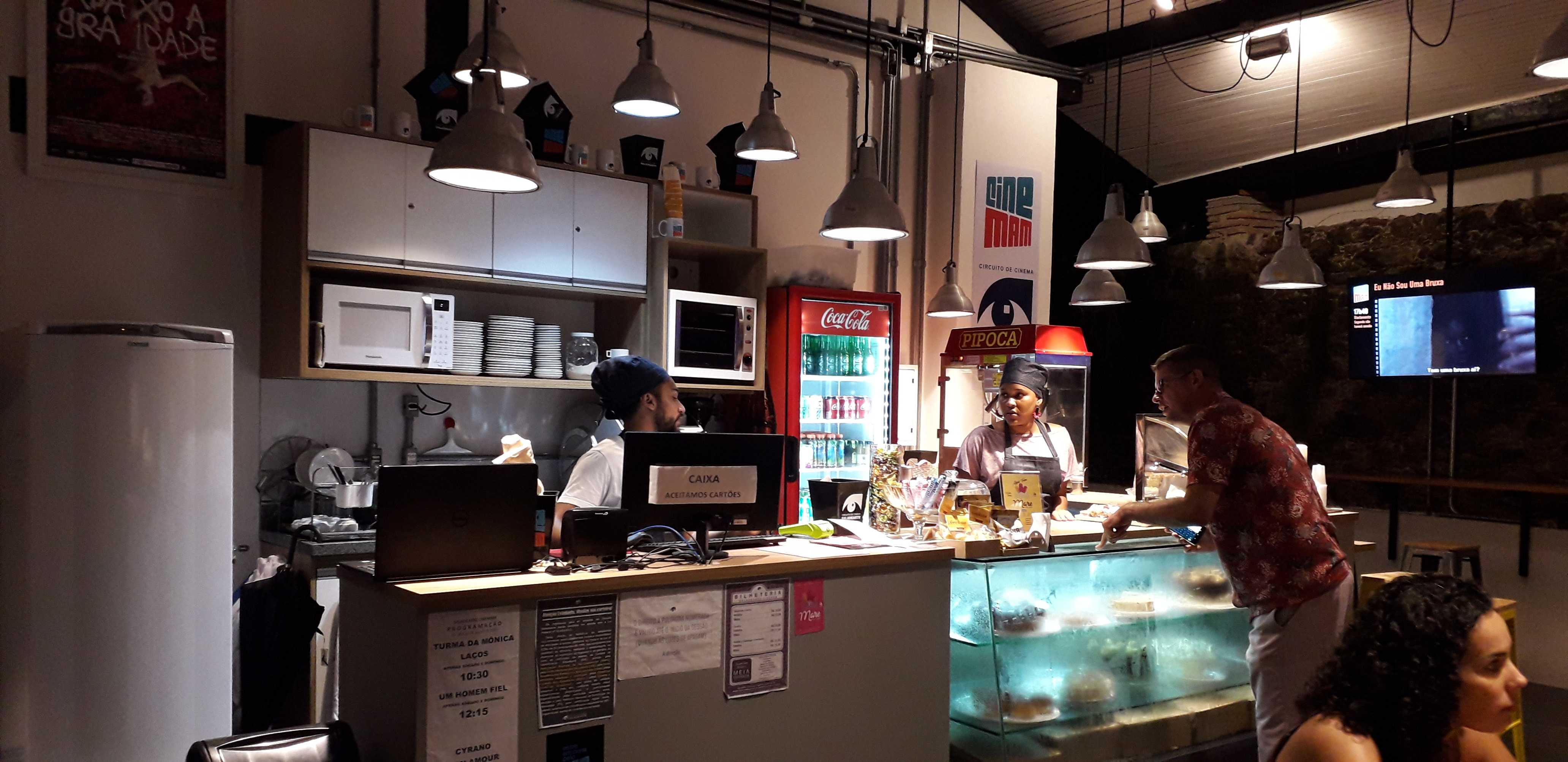 Imagens da Saladearte Cinemam, instalada no Museu de Arte Moderna da Bahia.